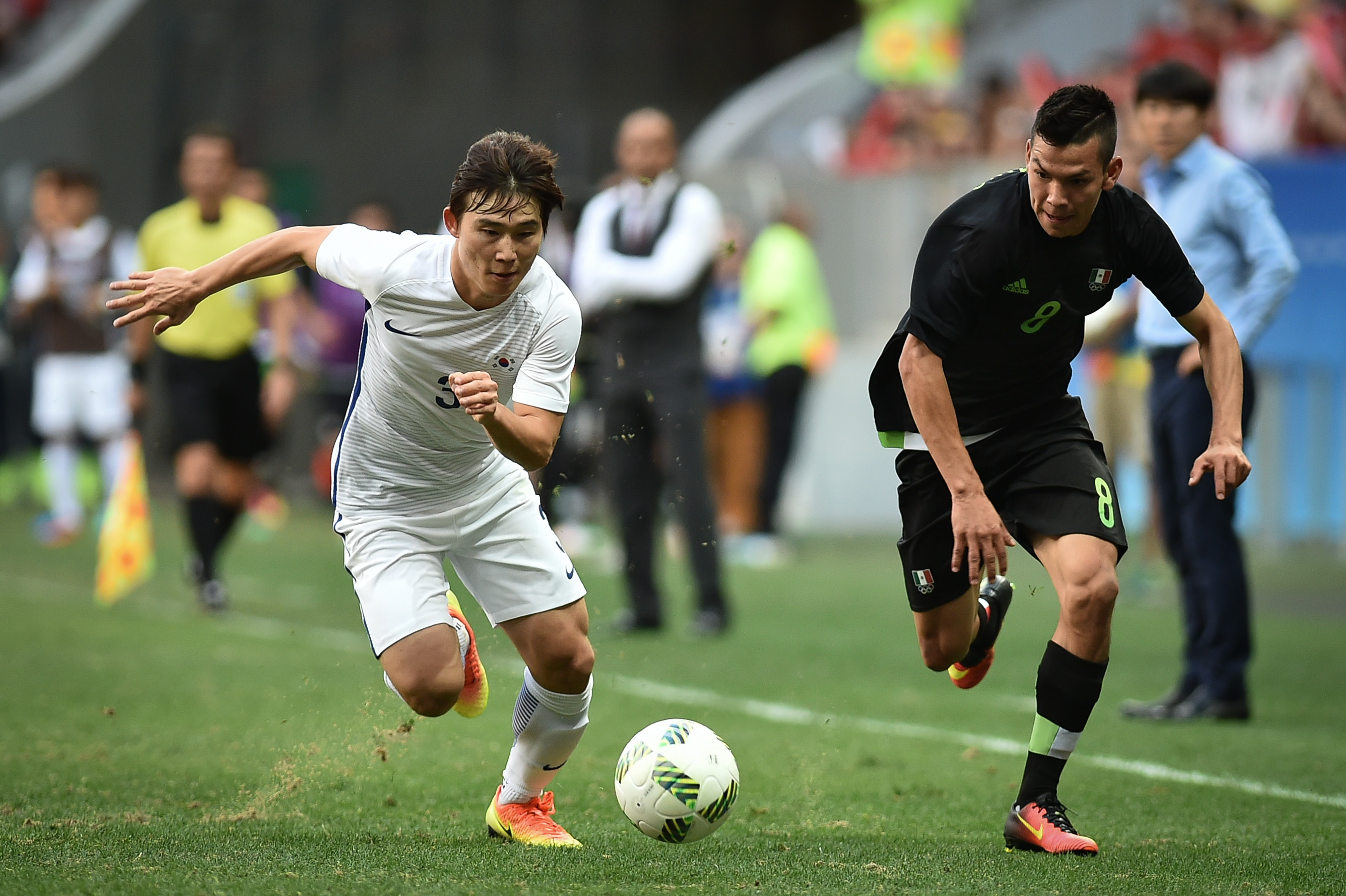 Estádio Nacional de Brasília Mané Garrincha, Brasília, DF, Brasil, 10/8/2016 Foto: Andre Borges/Agência Brasília. O time da Coréia do Sul classificou-se para a próxima fase do torneio de futebol masculino da Olimpíada com uma vitória por 1 a 0 contra o México. Kwon Chang-hoon marcou o gol da vitória sul-coreana aos 32 minutos do segundo tempo.